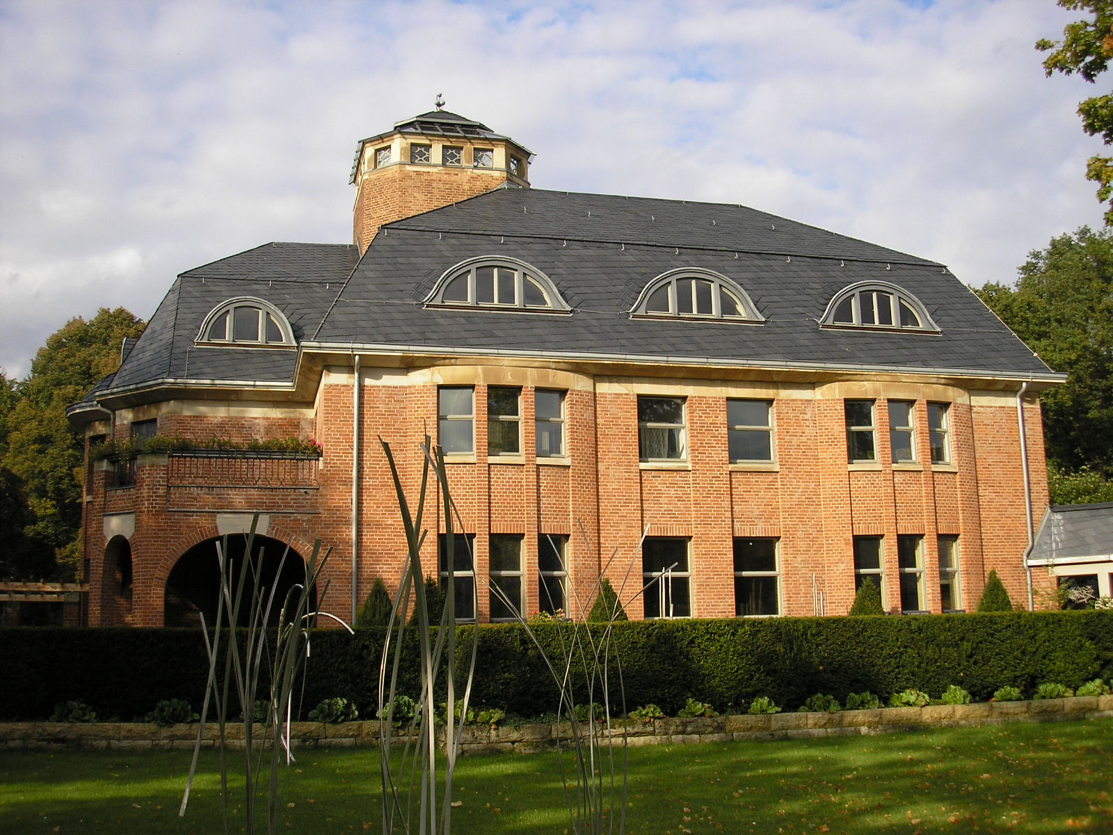 Die Villa Schulenburg in Gera (Thüringen).